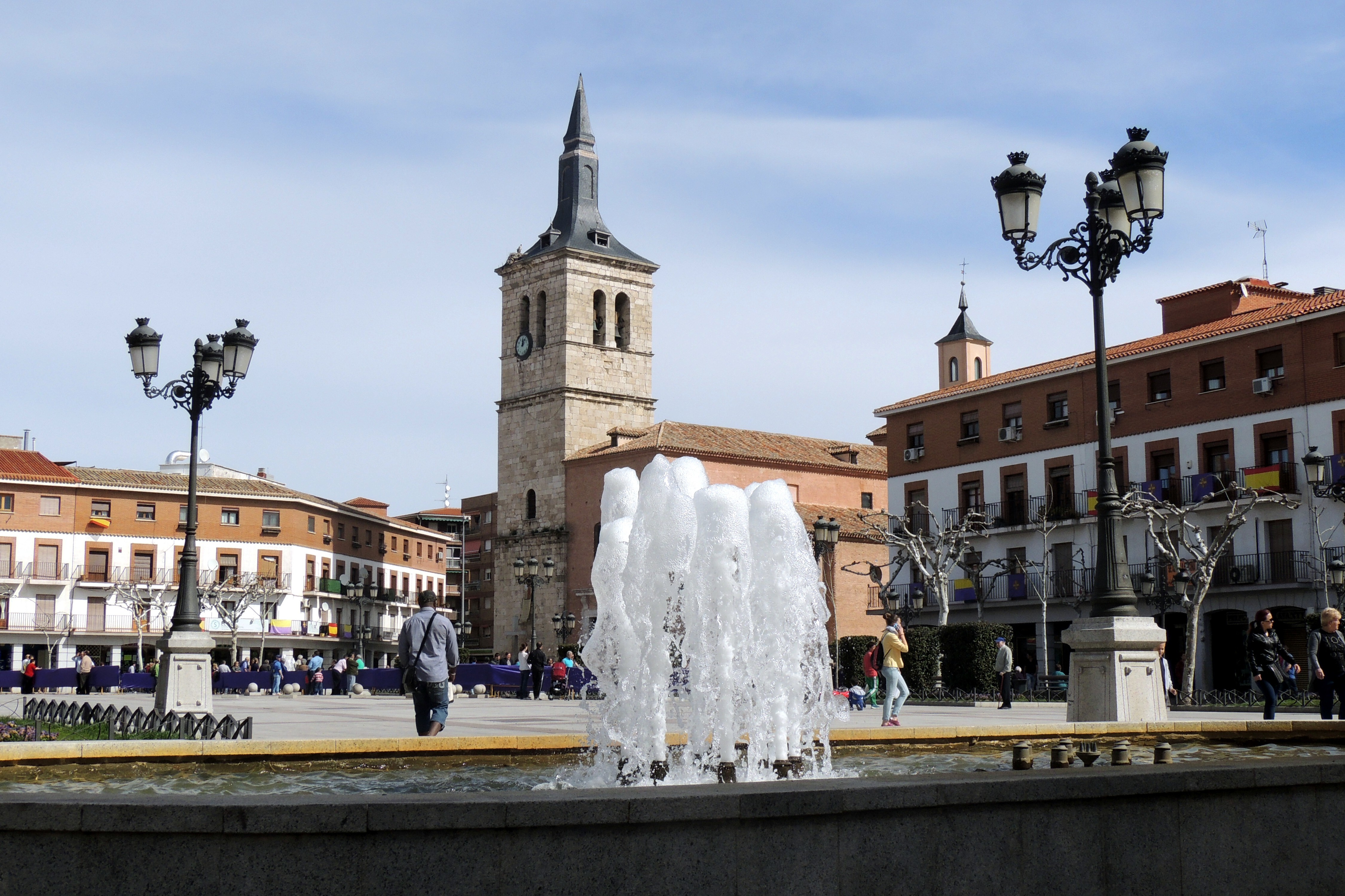 4442-Torrejon de Ardoz (Madrid)